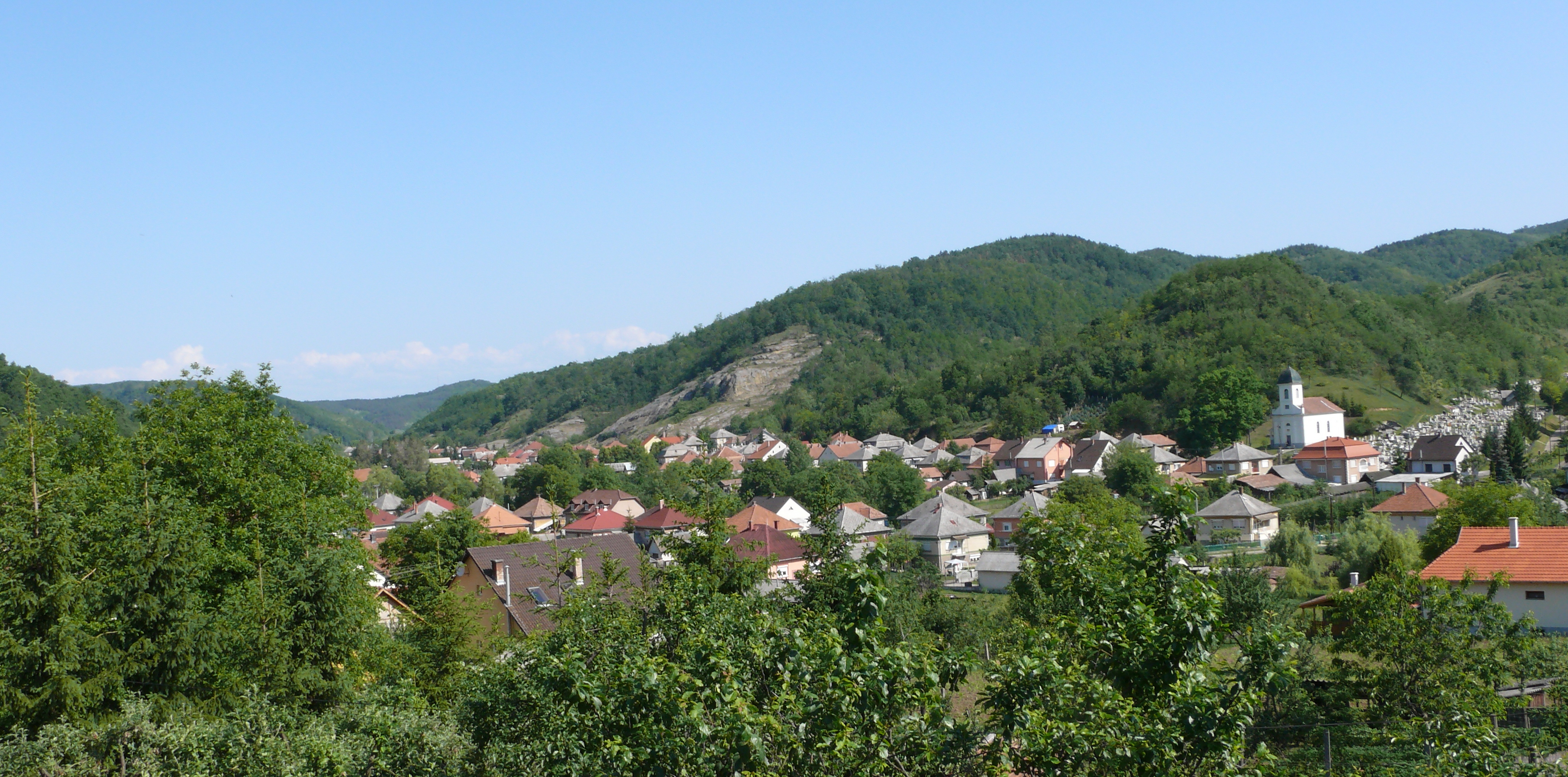 Istenmezeje község panorámaképe 2012.05.27.